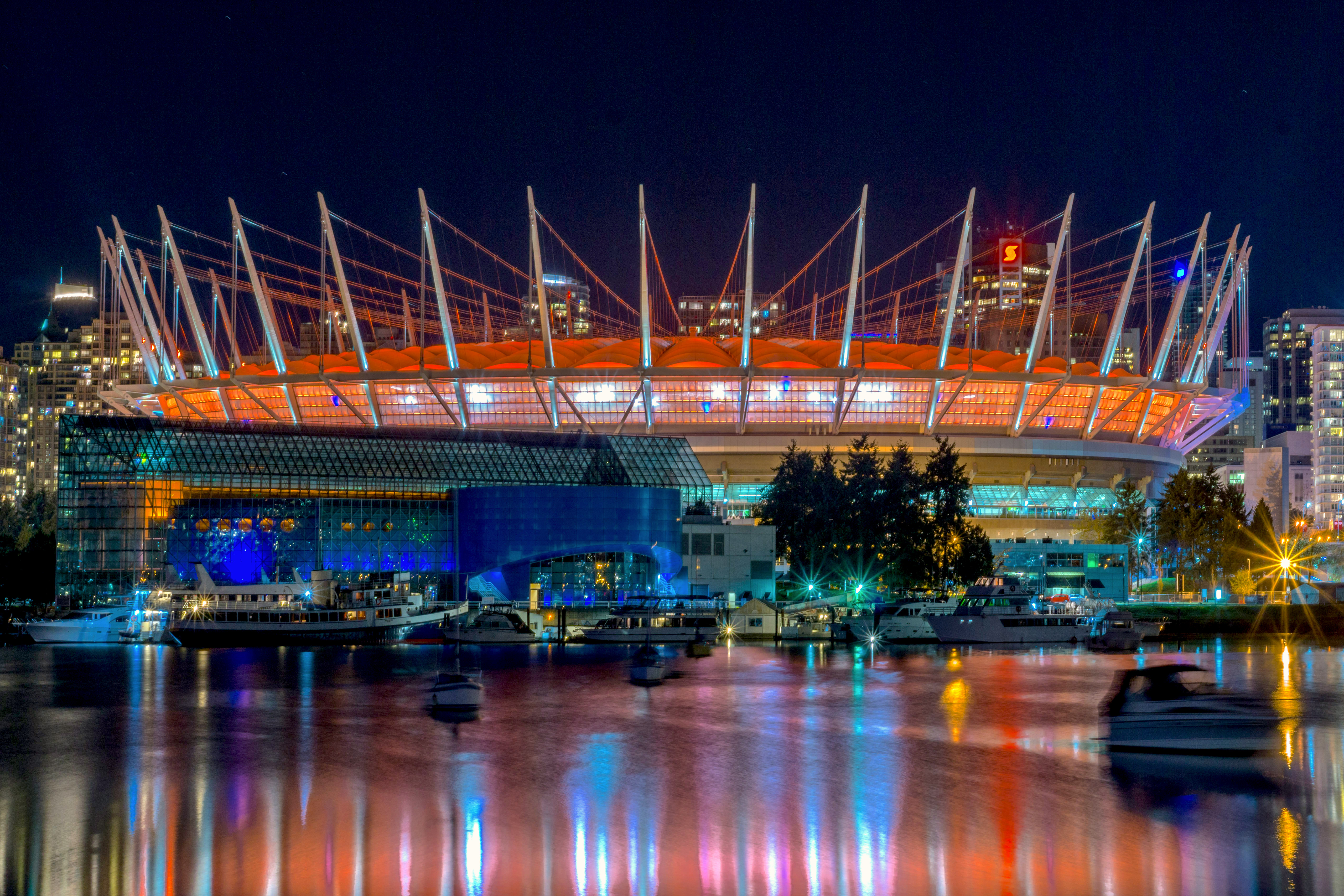 BC Place Stadium